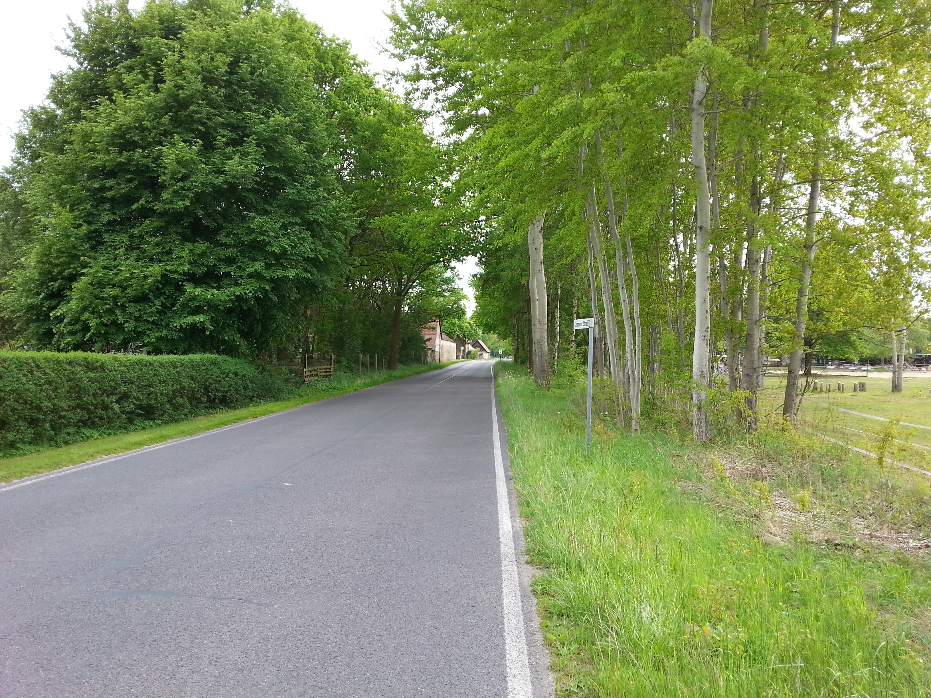 Dannenreich, Ortseingang